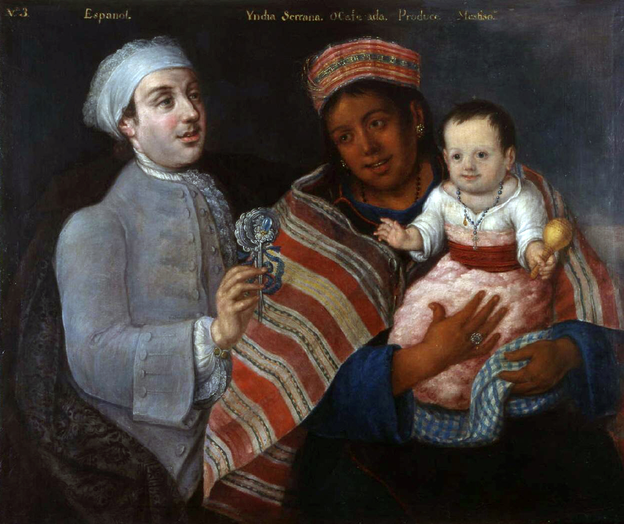 De la serie Los cuadros del mestizaje del Virrey Amat